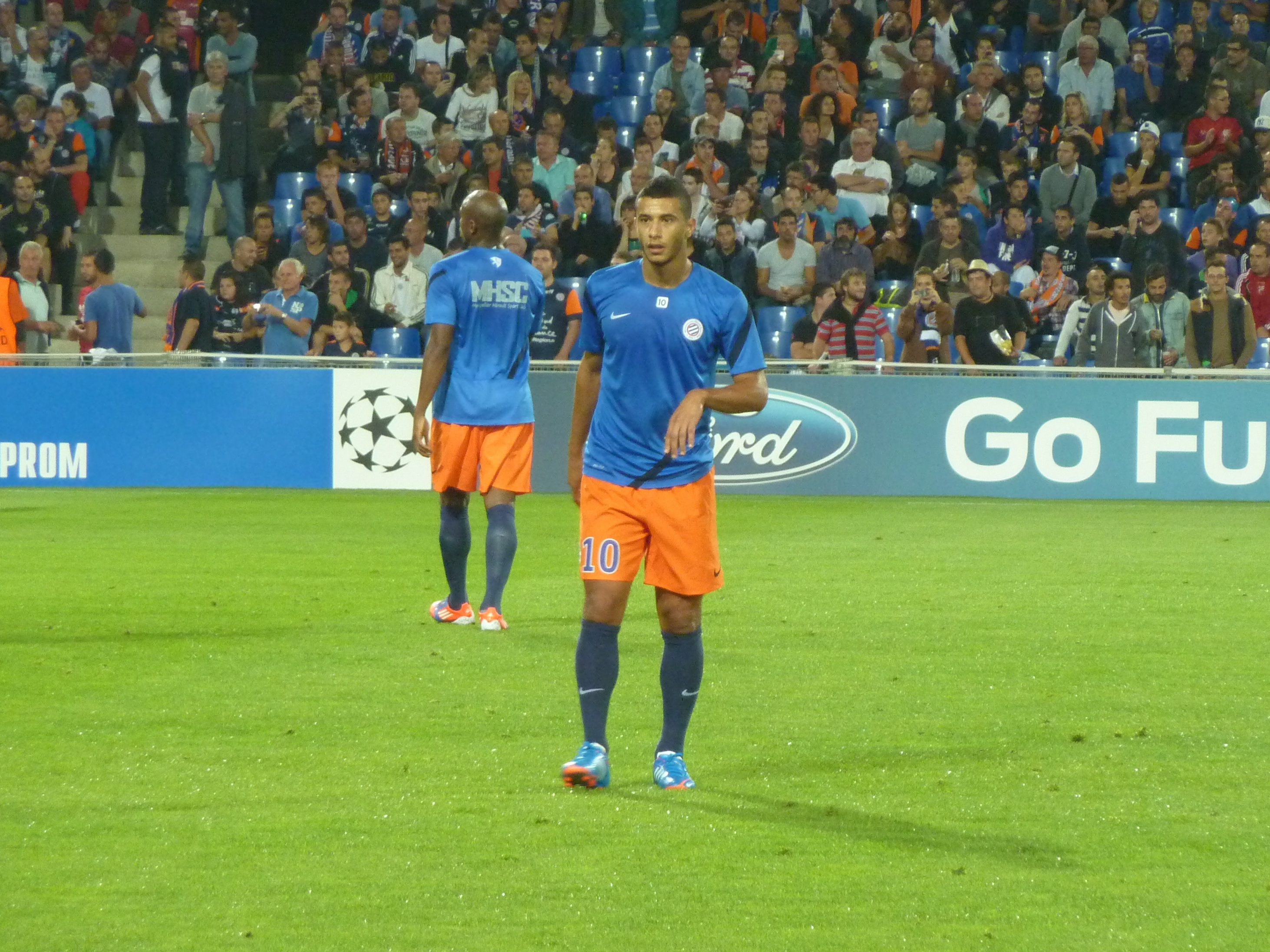 Younès Belhanda lors du match MHSC - Arsenal (Ligue des Champions, Phase de poules, 1er match, 18/09/2012)